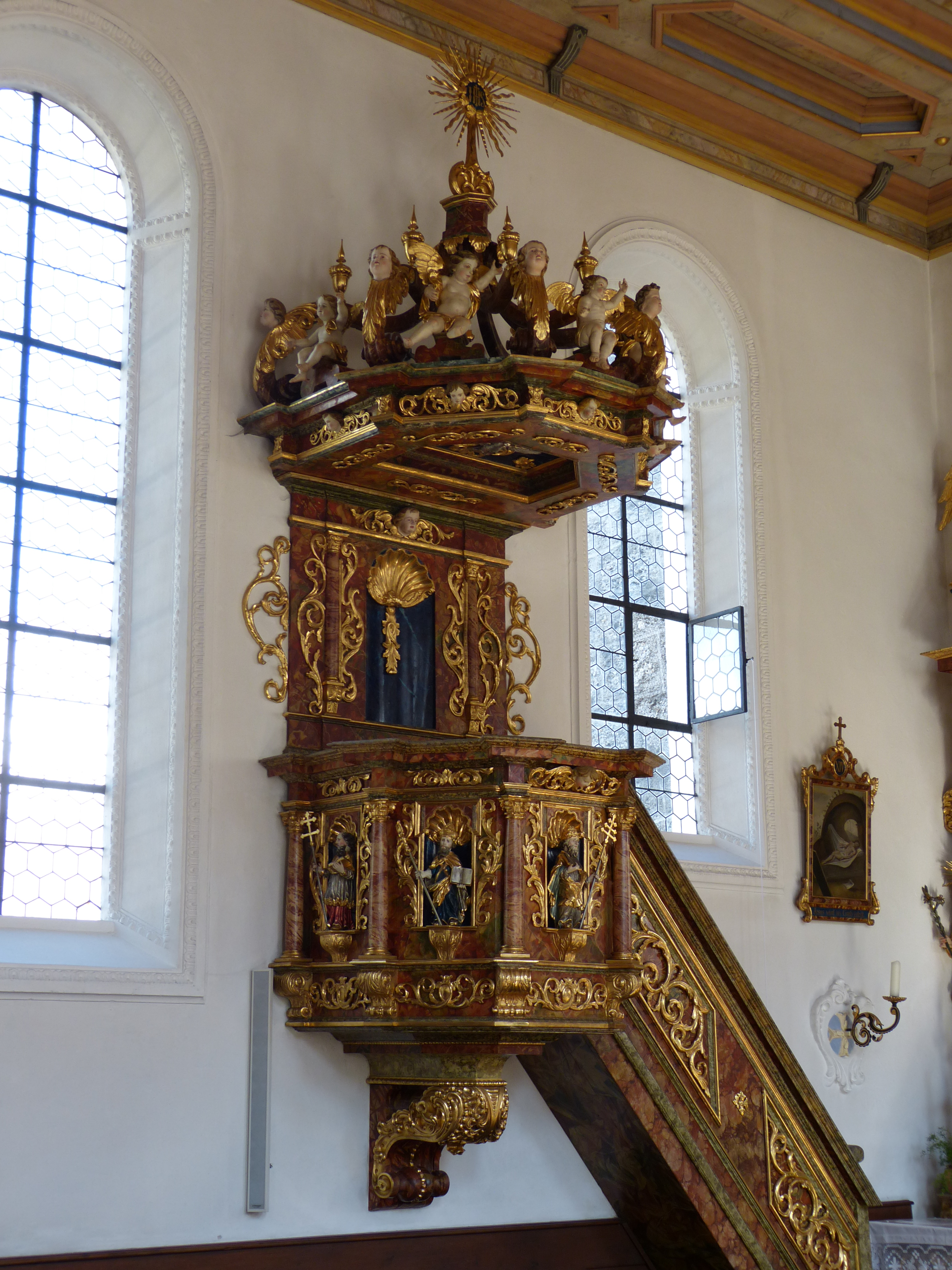 St. Peter und Paul in Günz, Landkreis Unterallgäu, Bayern